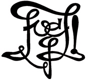 Fraternitas Livonica cirķelis